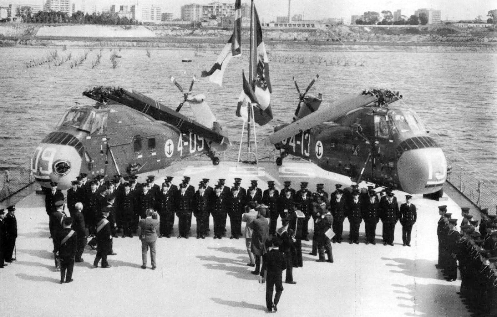 Taranto 18 marzo 1976: vistia di Re Gustavo di Svezia a bordo dell'incrociatore Andrea Doria